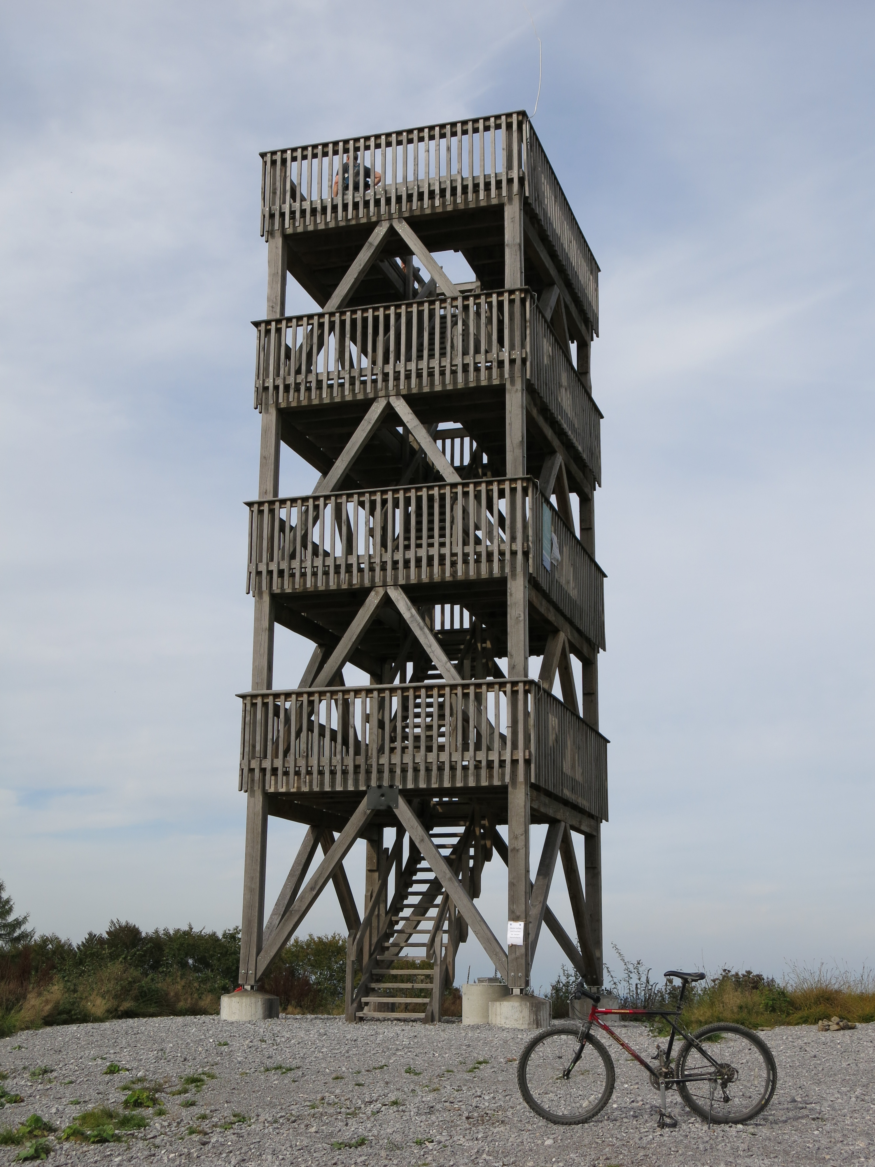 Der 2013 errichtete Aussichtsturm auf dem Ebberg bei Balve-Eisborn im Sauerland